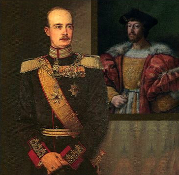 Friedrich Franz III van Mecklenburg-Schwerin